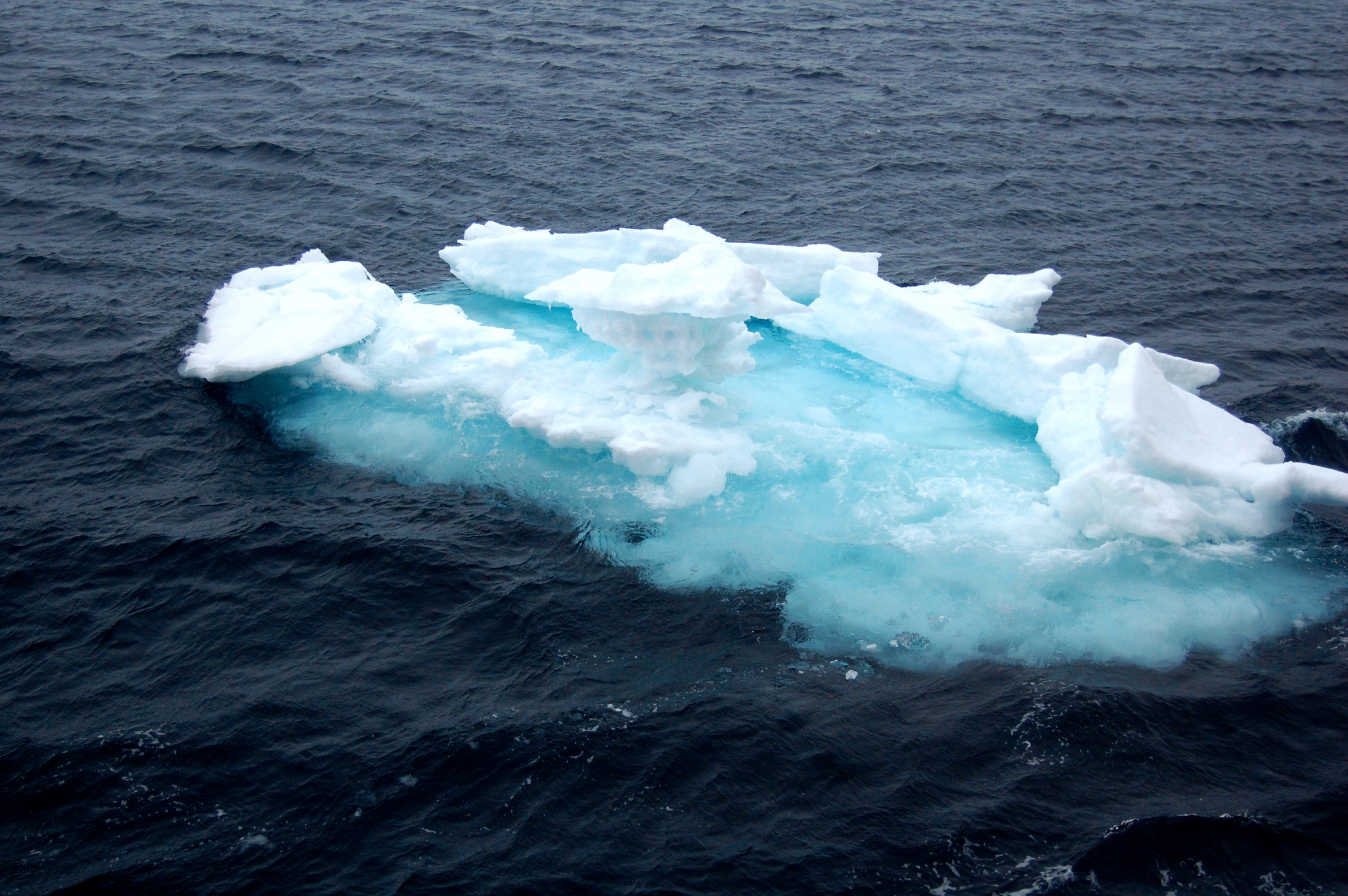 Дрейфующий лёд в Акртике